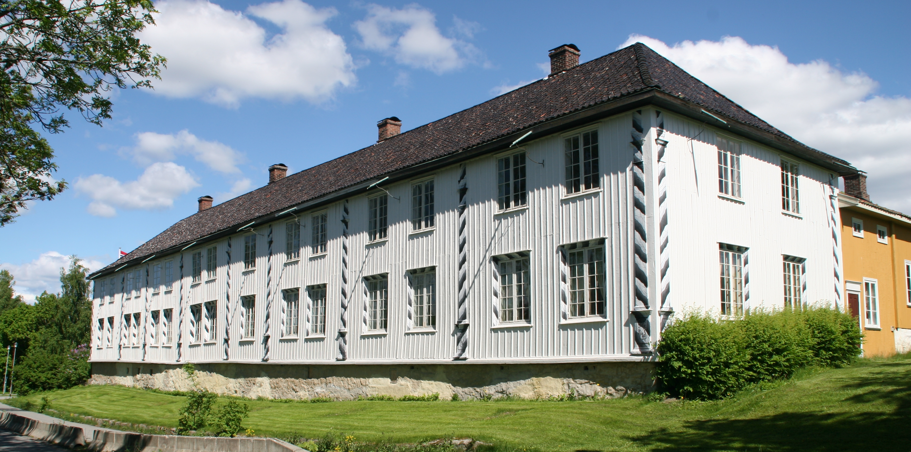 Fossesholm manor in Vestfossen, Norway